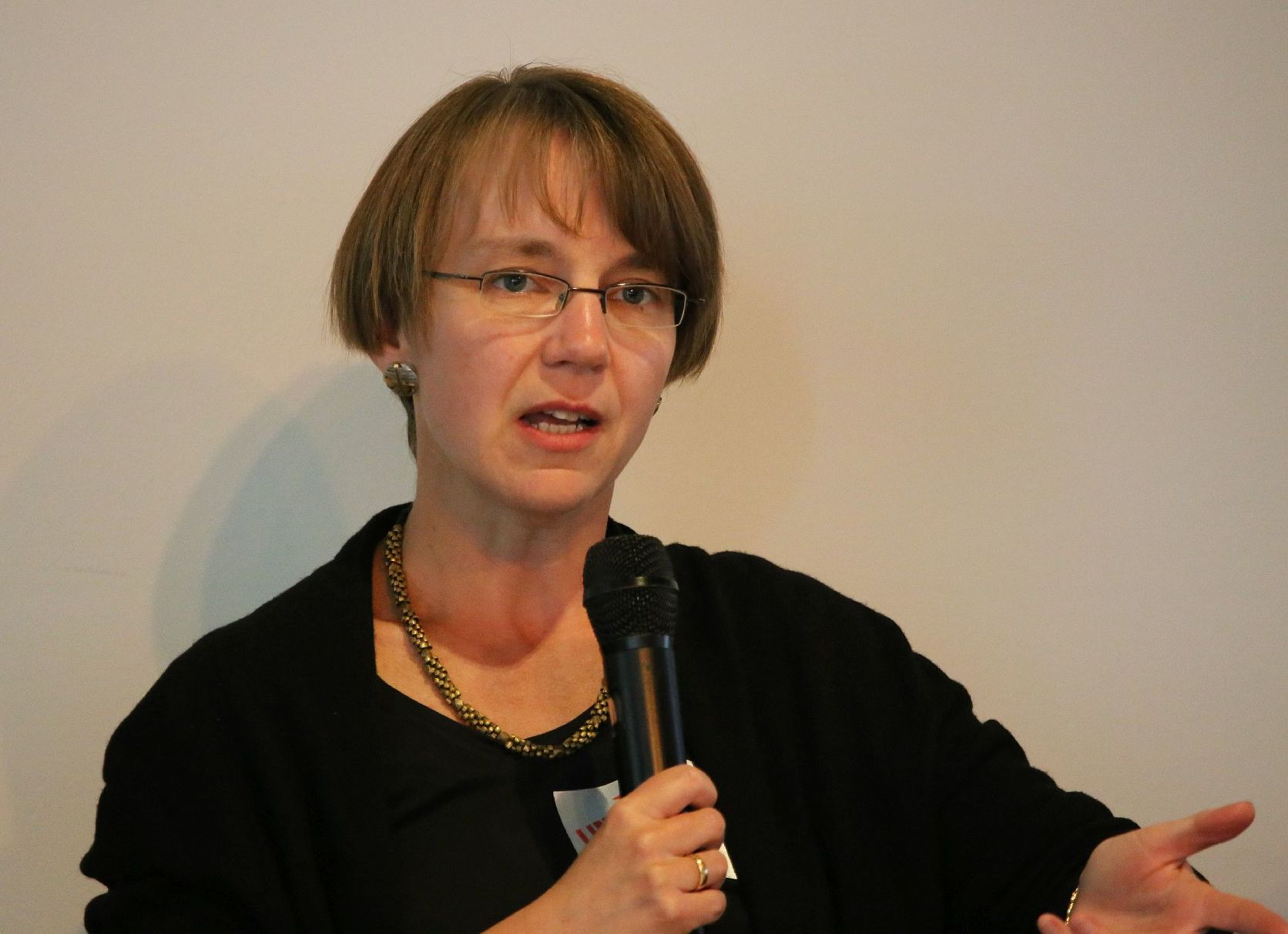 Gespräch über Gerechtigkeit und Gleichheit 14 Uhr Stephan Lessenich und Wolfgang Engler diskutieren über Zukunft und Gegenwart Mehr Lohn statt Verzicht. Spaltung der Belegschaft verhindern 16:30 Uhr Berlin, 24.4.2015 Im Rahmen der Linken Woche der Zukunft